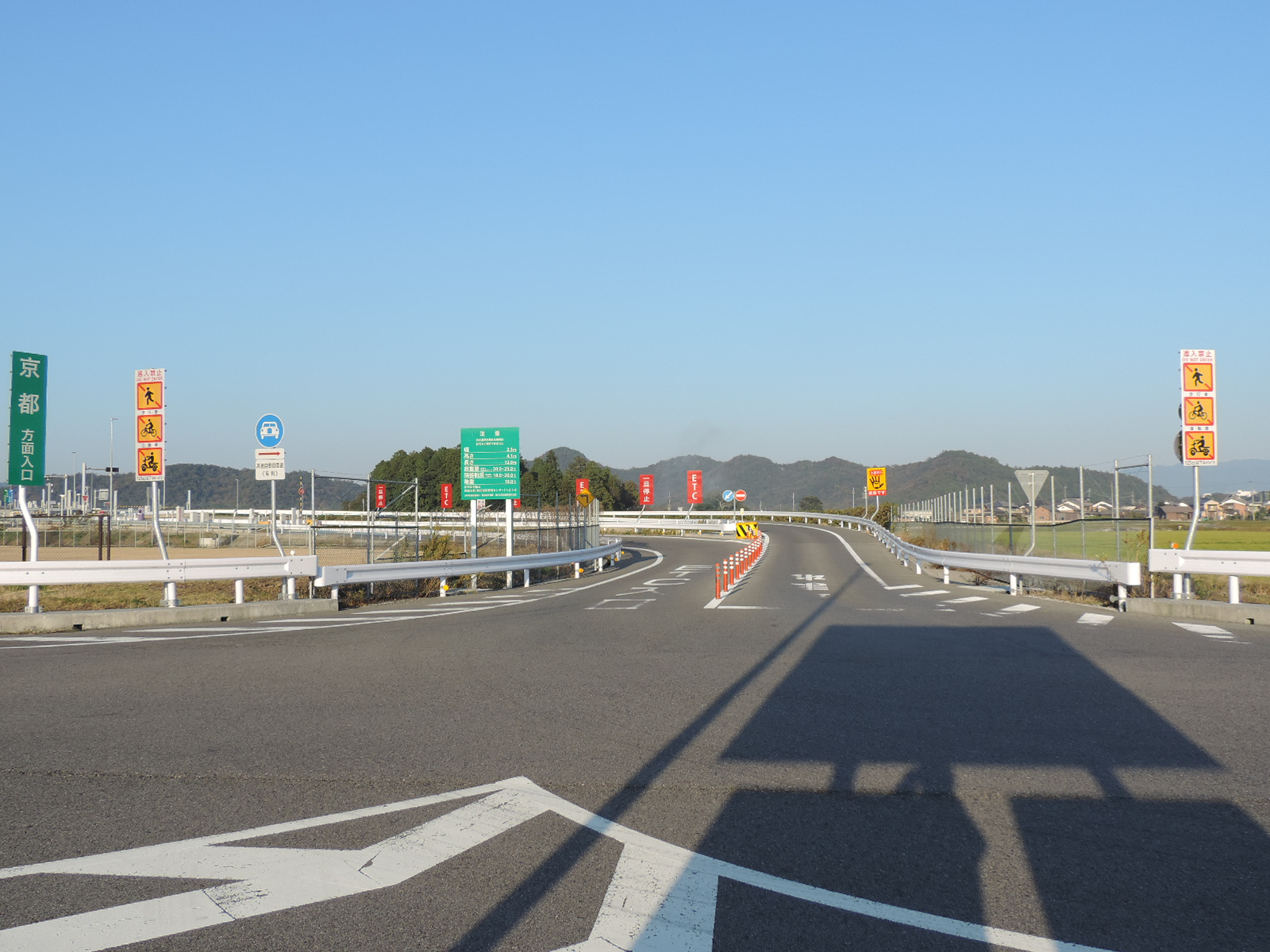 蒲生IC下り線出入口（滋賀県東近江市：2017年撮影）